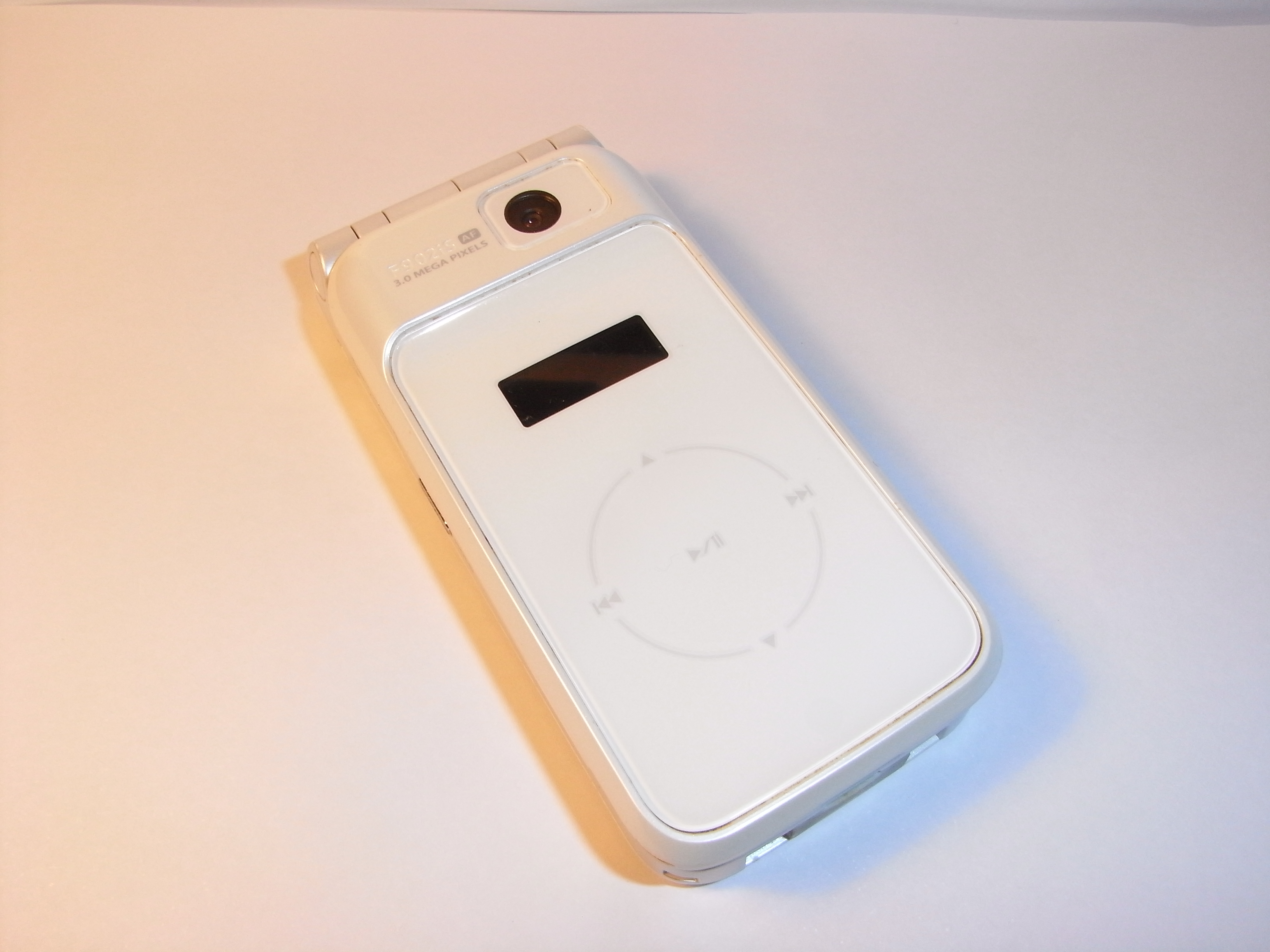 NTT docomo F902iS(F902iS